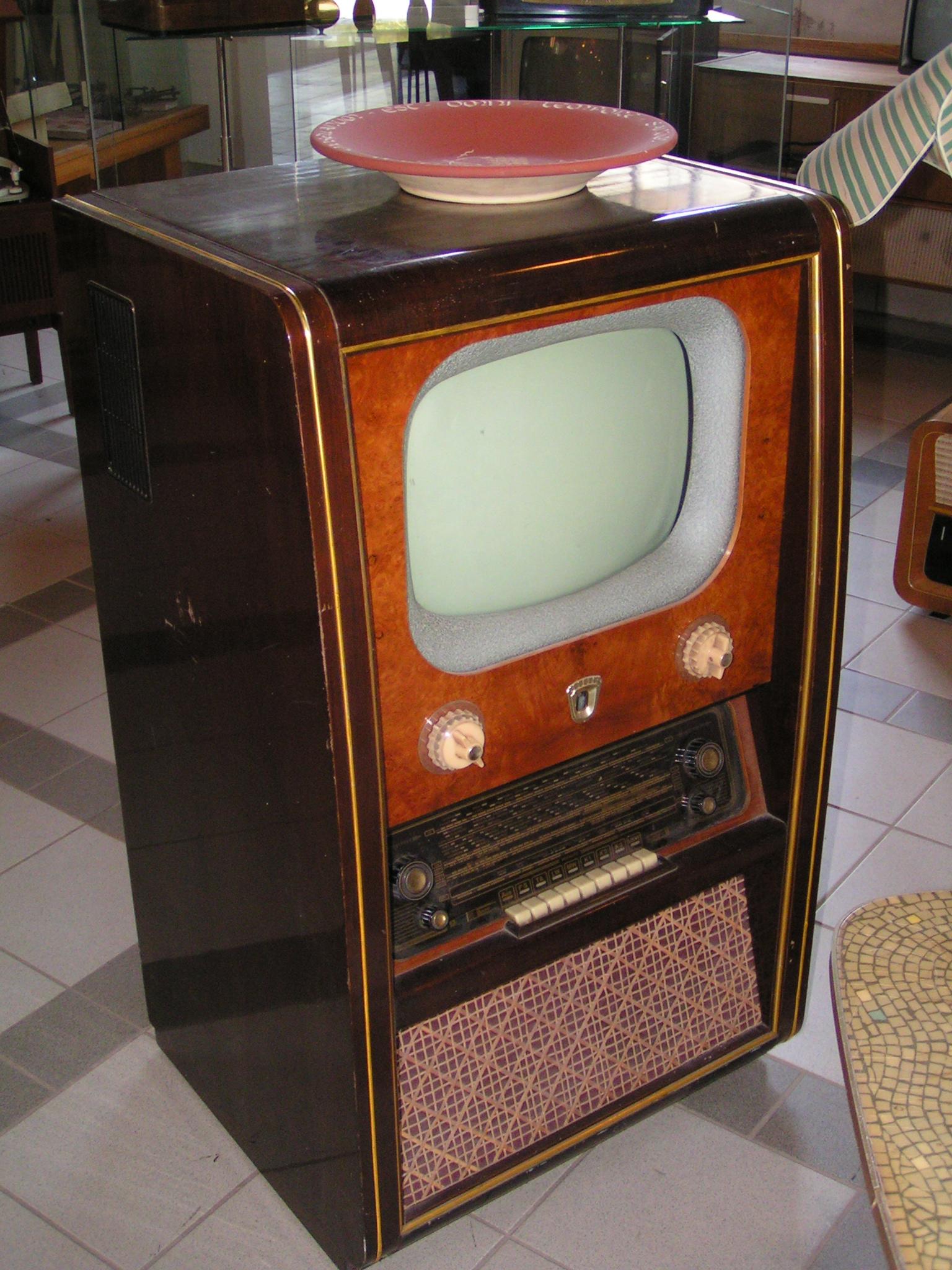 Beschreibung: Clivia II FER858A des VEB Rafena Werke Radeberg auf dem Roscheider Hof bei Konz (1. August 2004) Quelle: selbst erstellt Fotograf: Stefan Kühn